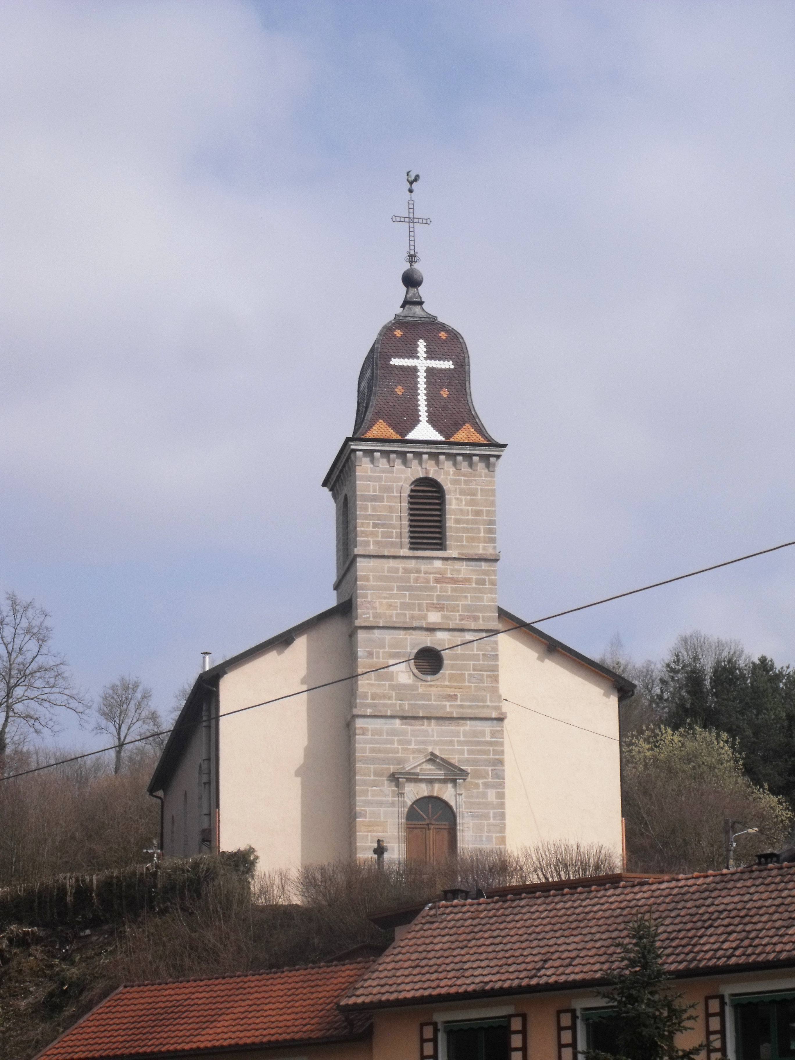 Eglise de Médière, Doubs, France